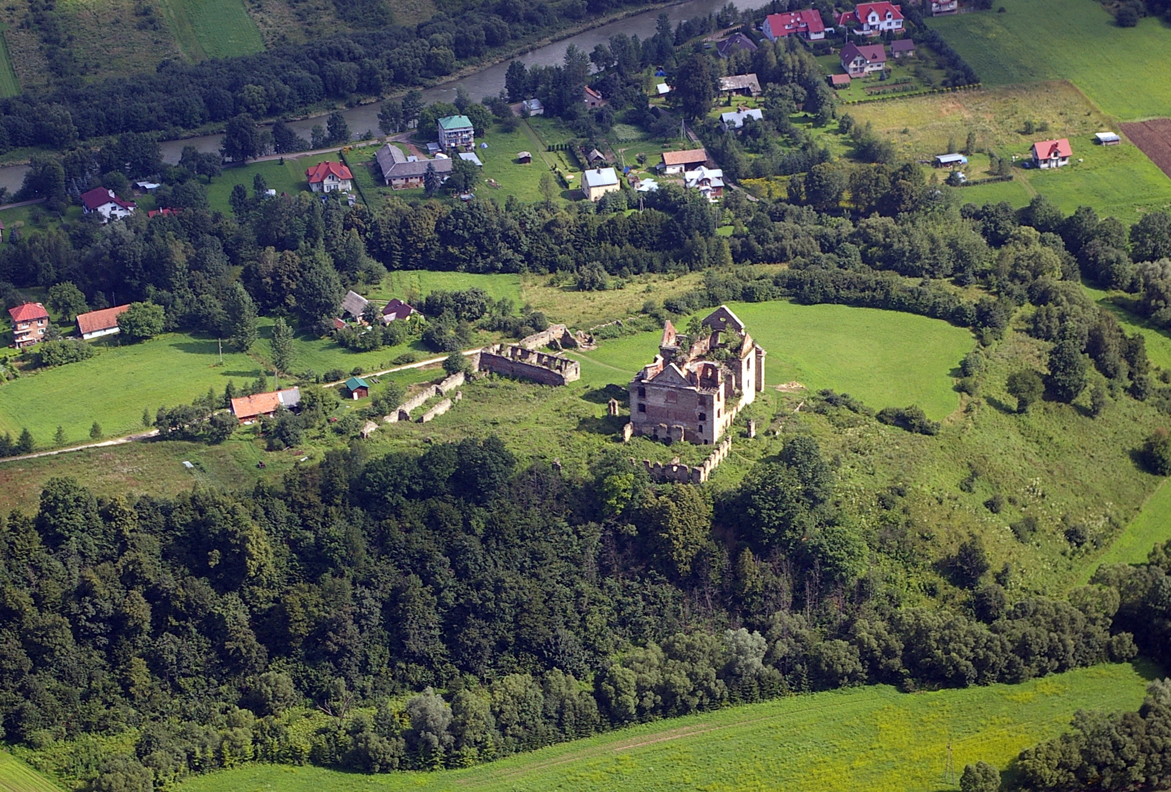 Zagórz, ruina klasztoru, pocz. XVIII, 1772, 1822, 1957-1962